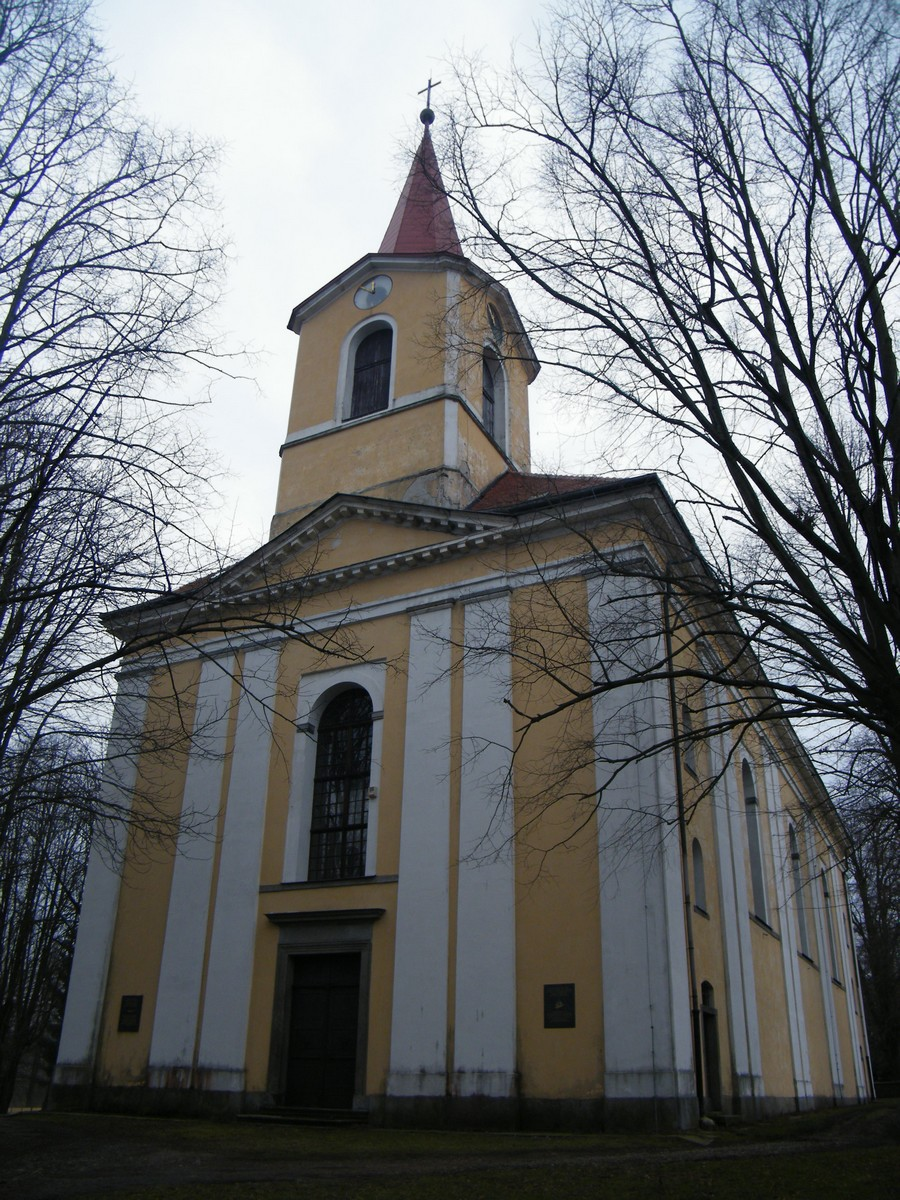 Kostel svatého Vavřince v Království u Šluknova